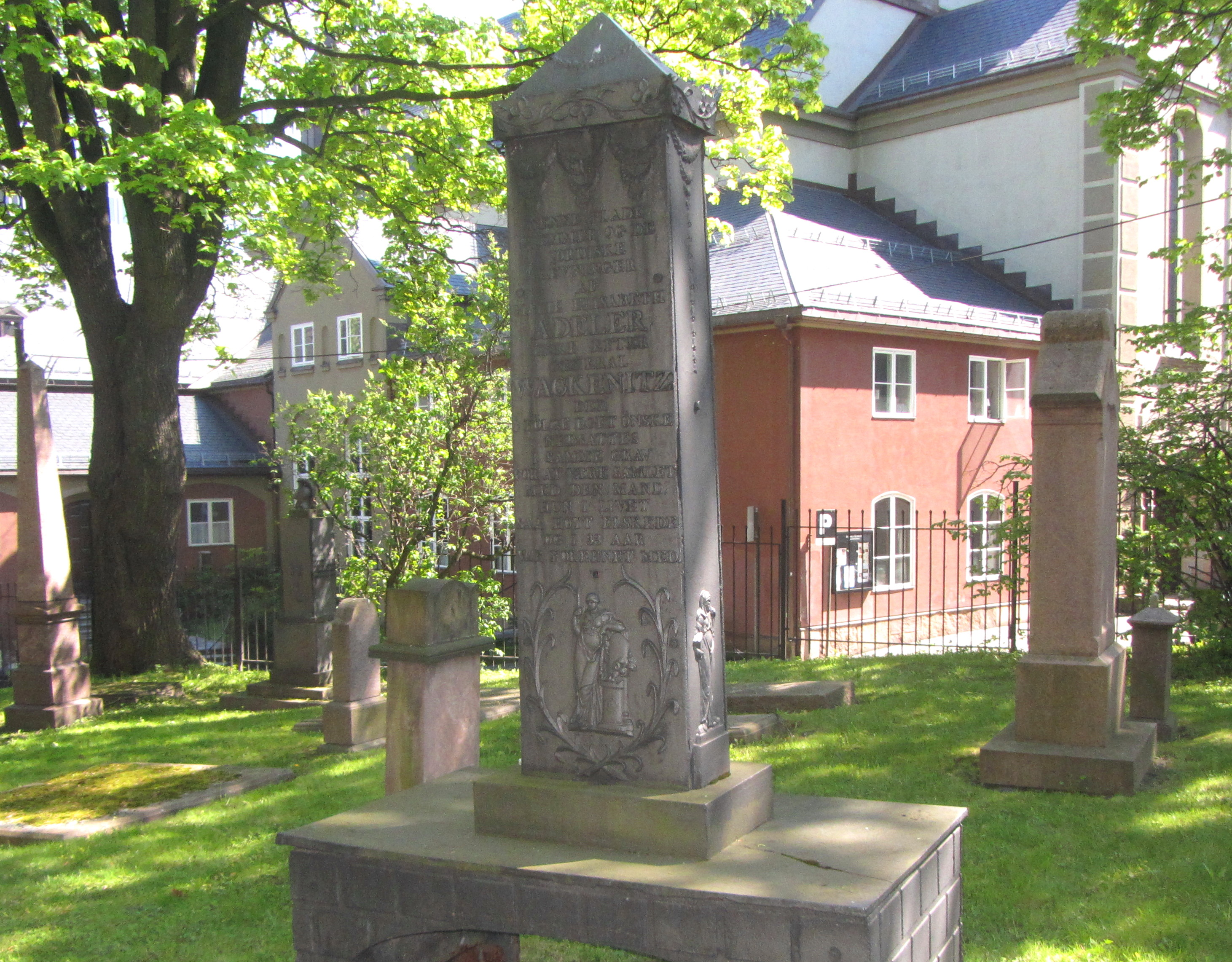 Grave of August Friedrich von Wackenitz (1726-1808), Dano-Norwegian General